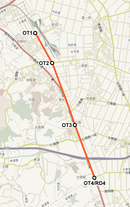 2000年時高雄捷運大寮延伸線的版本